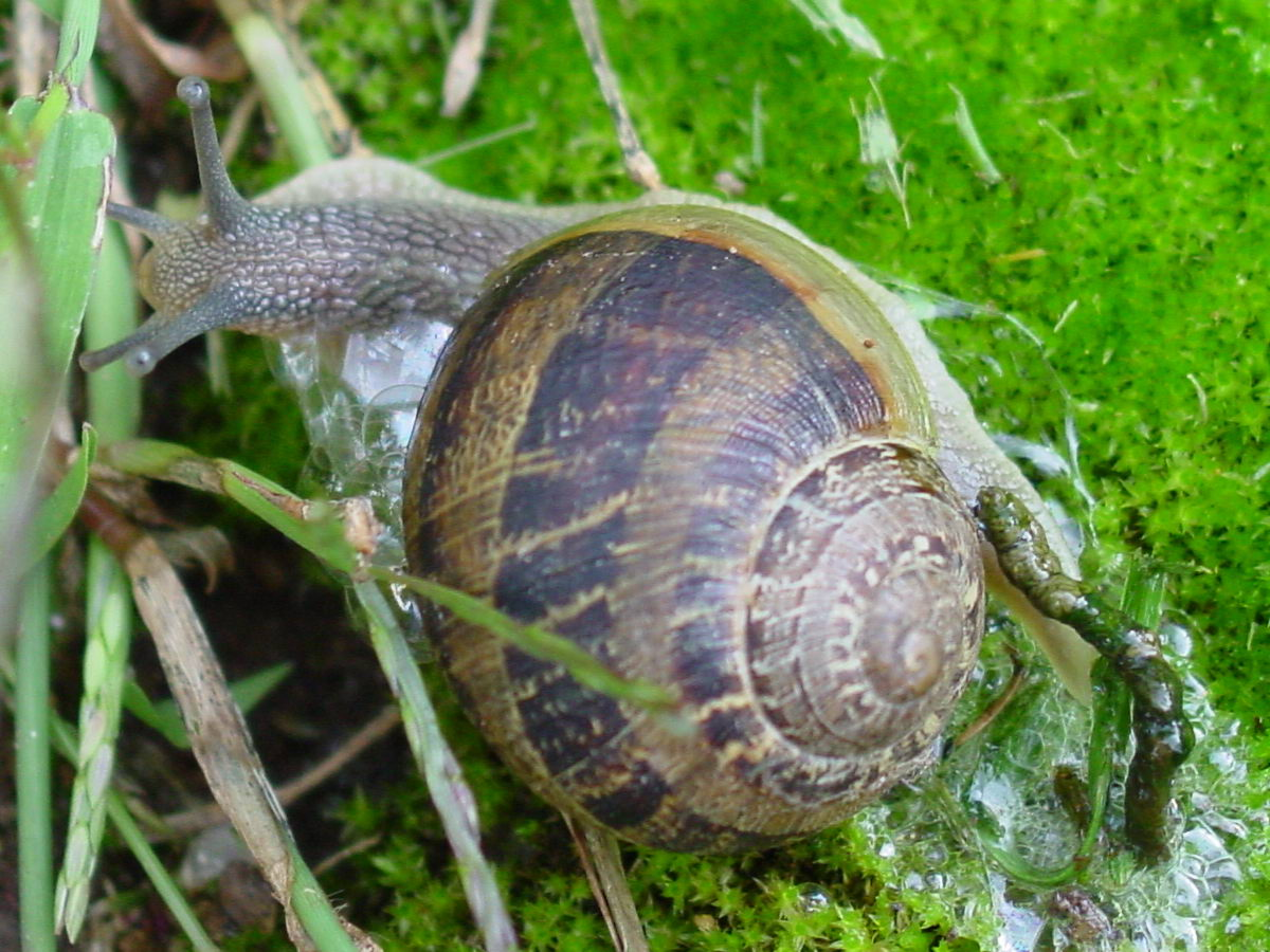 self made. Foto realizada en Bastabales - Galicia - Spain